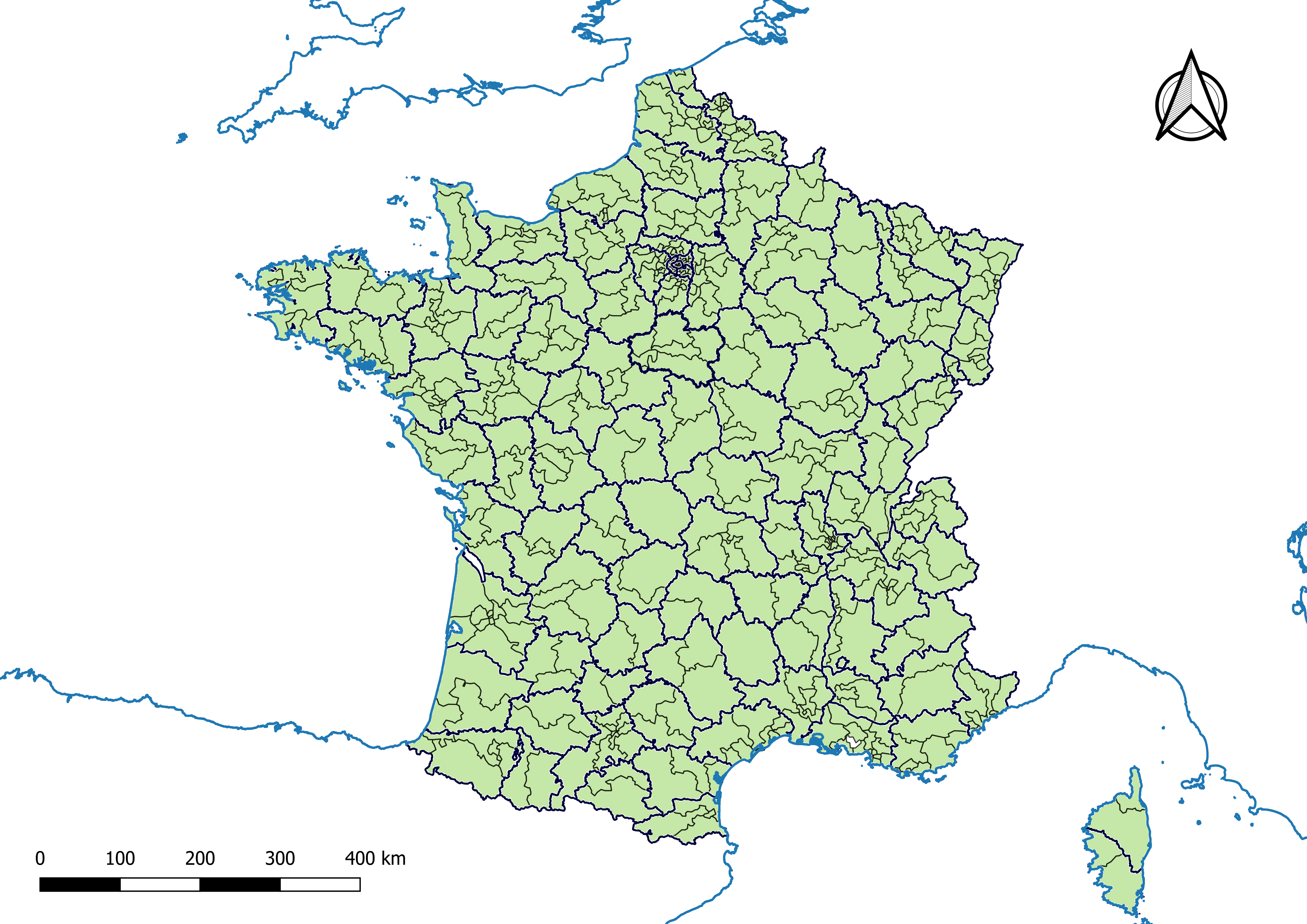 Carte des circonscriptions législatives en France métropolitaine. , créée sous Inkscape 0.92